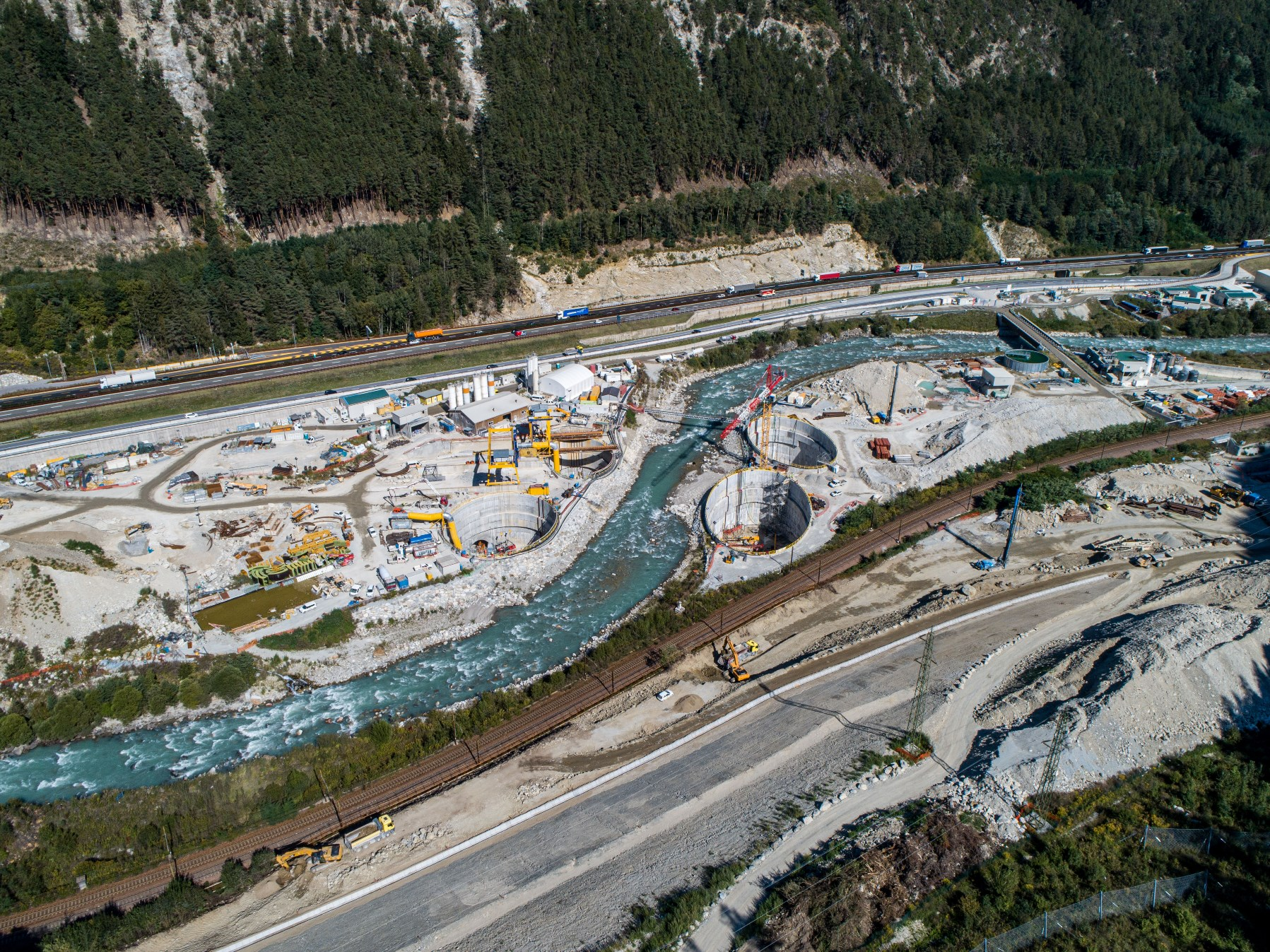 von oben nach unten: Brennerautobahn A22, Staatsstraße SS12, Fluss Eisack mit 4 Schächten zum Bau des BBT, Brennerbahn